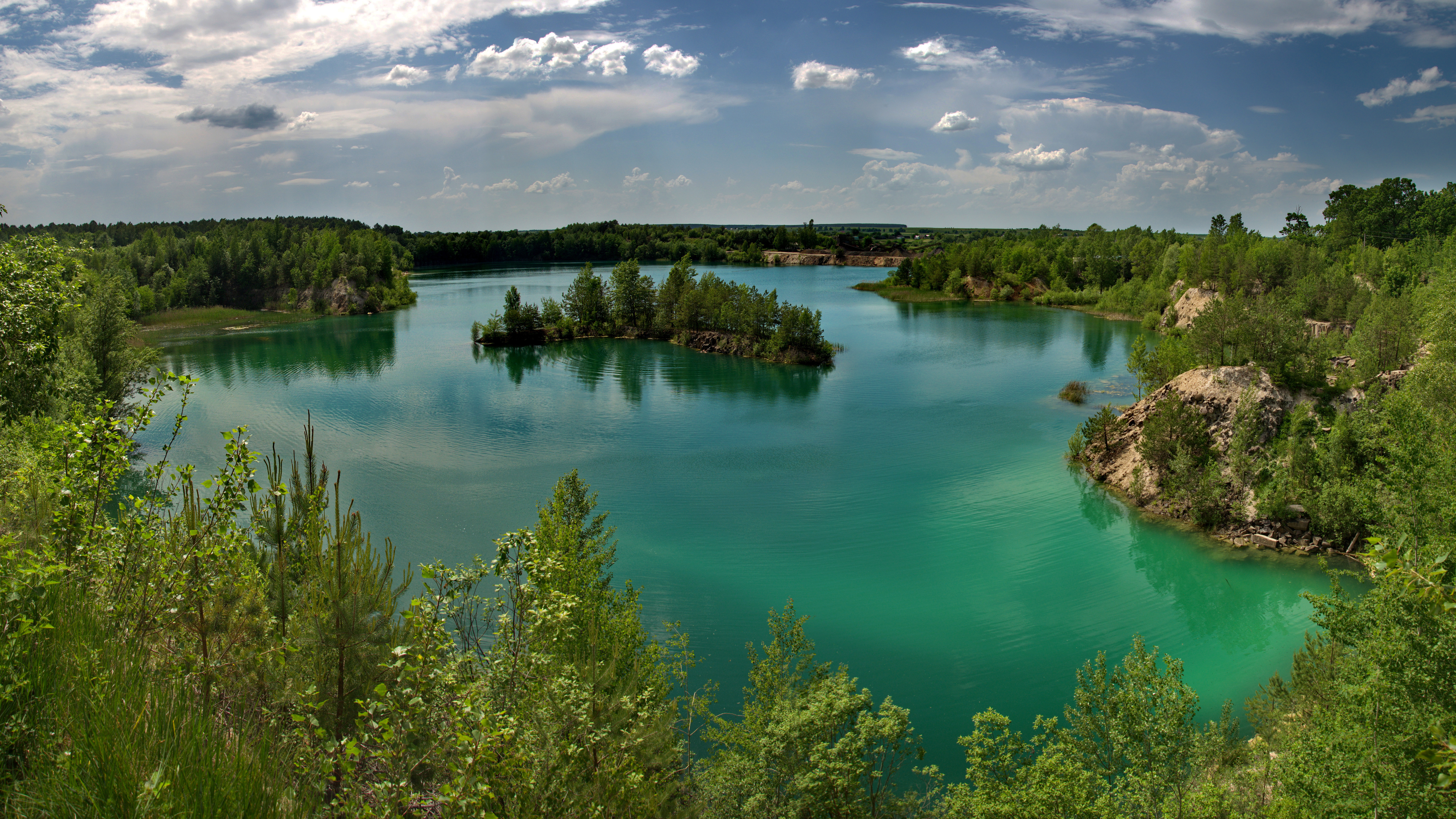 Базальтові стовпи, Костопільський район